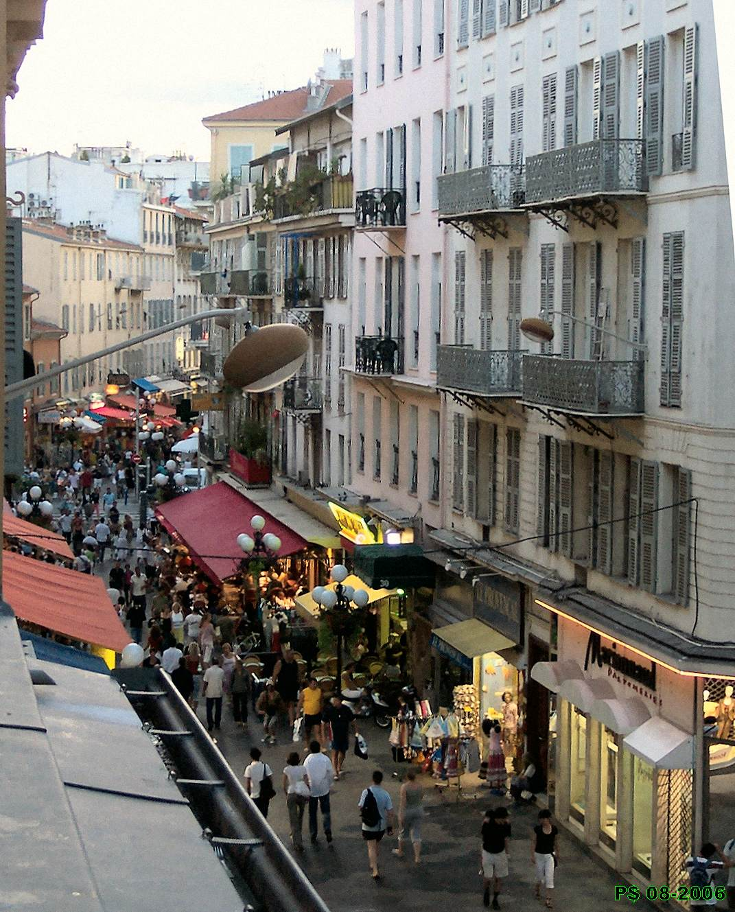 Nice - Quartier des Musiciens - Photo générique. Vue sur la rue de France du 2nd étage d'un restaurant. Zone piétonne. Prise de vue vers l'ouest au couchant (20h).